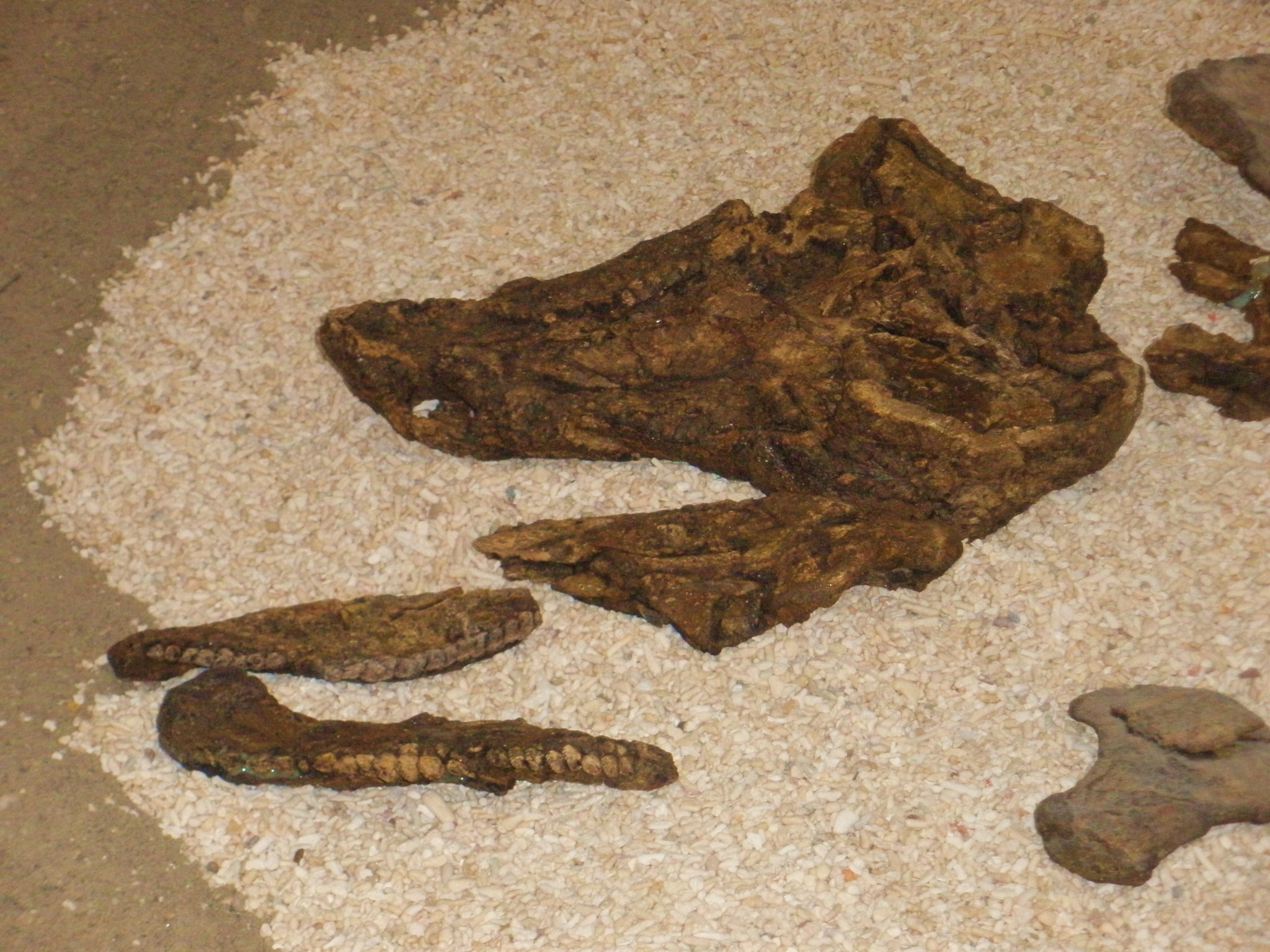 Fossil of Europelta, an ankylosaur, an extinct dinosaur- Took the photo at Fossil Show, Munich